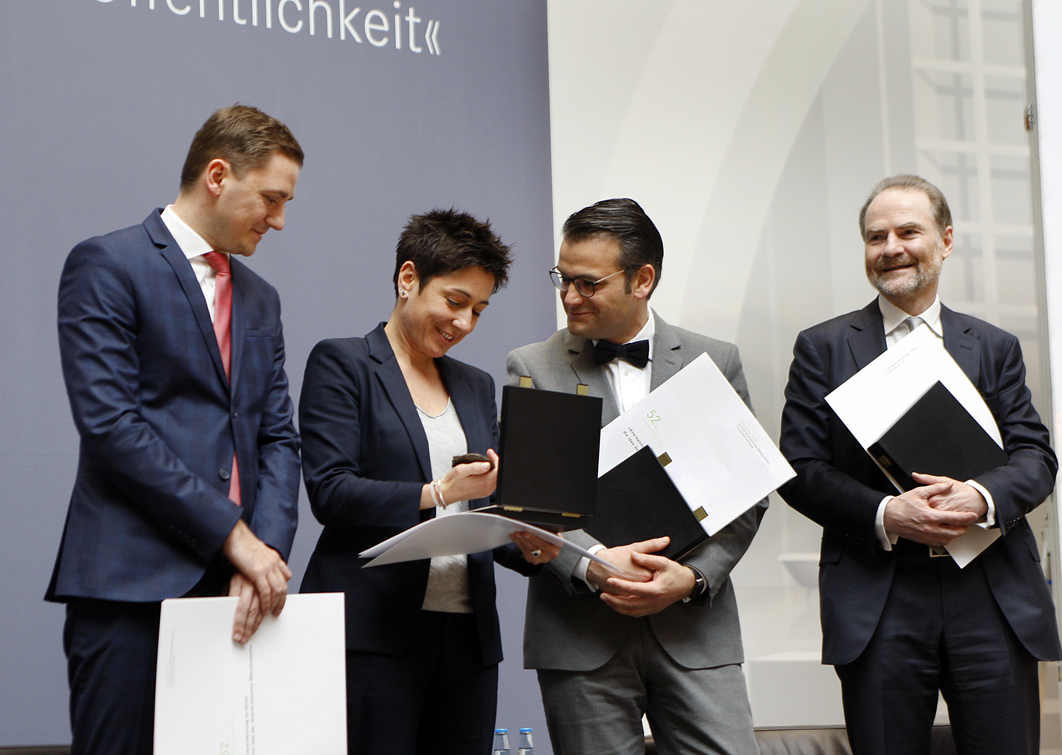 Fotografin Susanne Kern